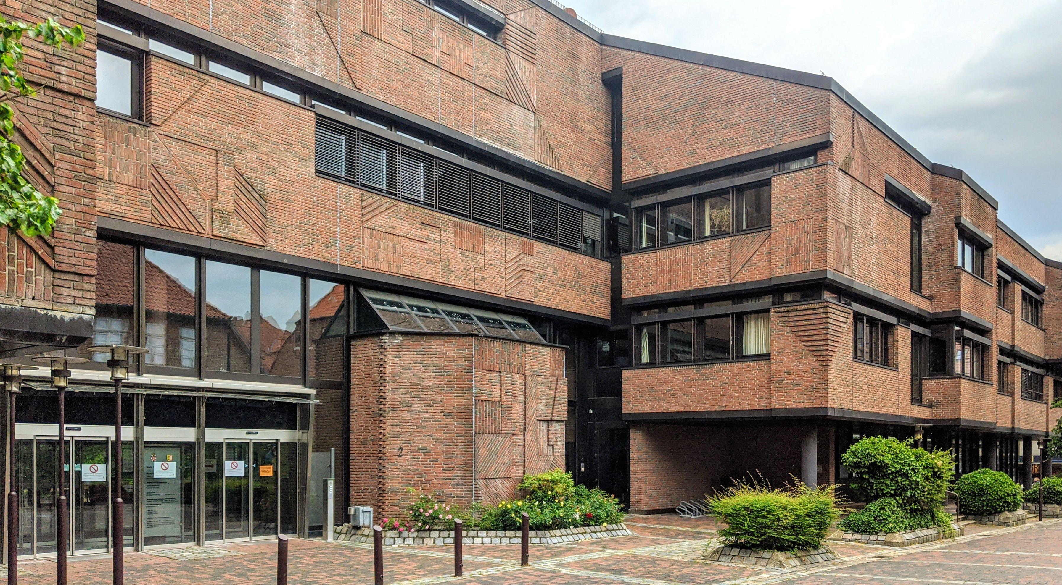 Neues Kreishaus Ratzeburg, Eingangsbereich Barlachstraße 2